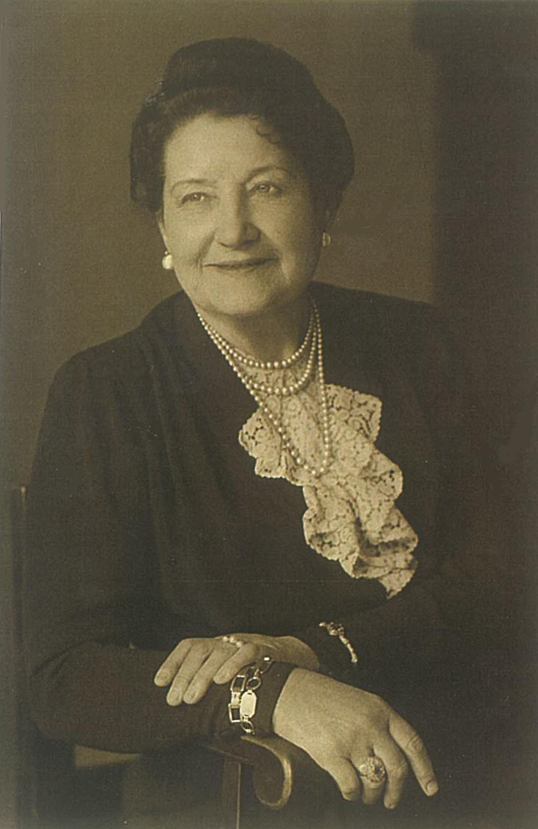 Mathilde Witzmann, Besitzerin des Hotel Stefanie in Wien.